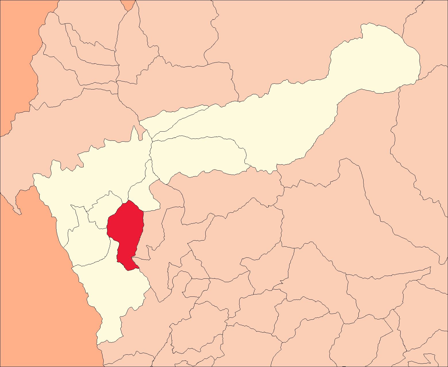 Ubicación del distrito de Sillapata.